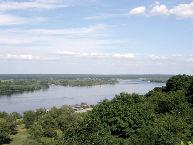 Канівський природний заповідник